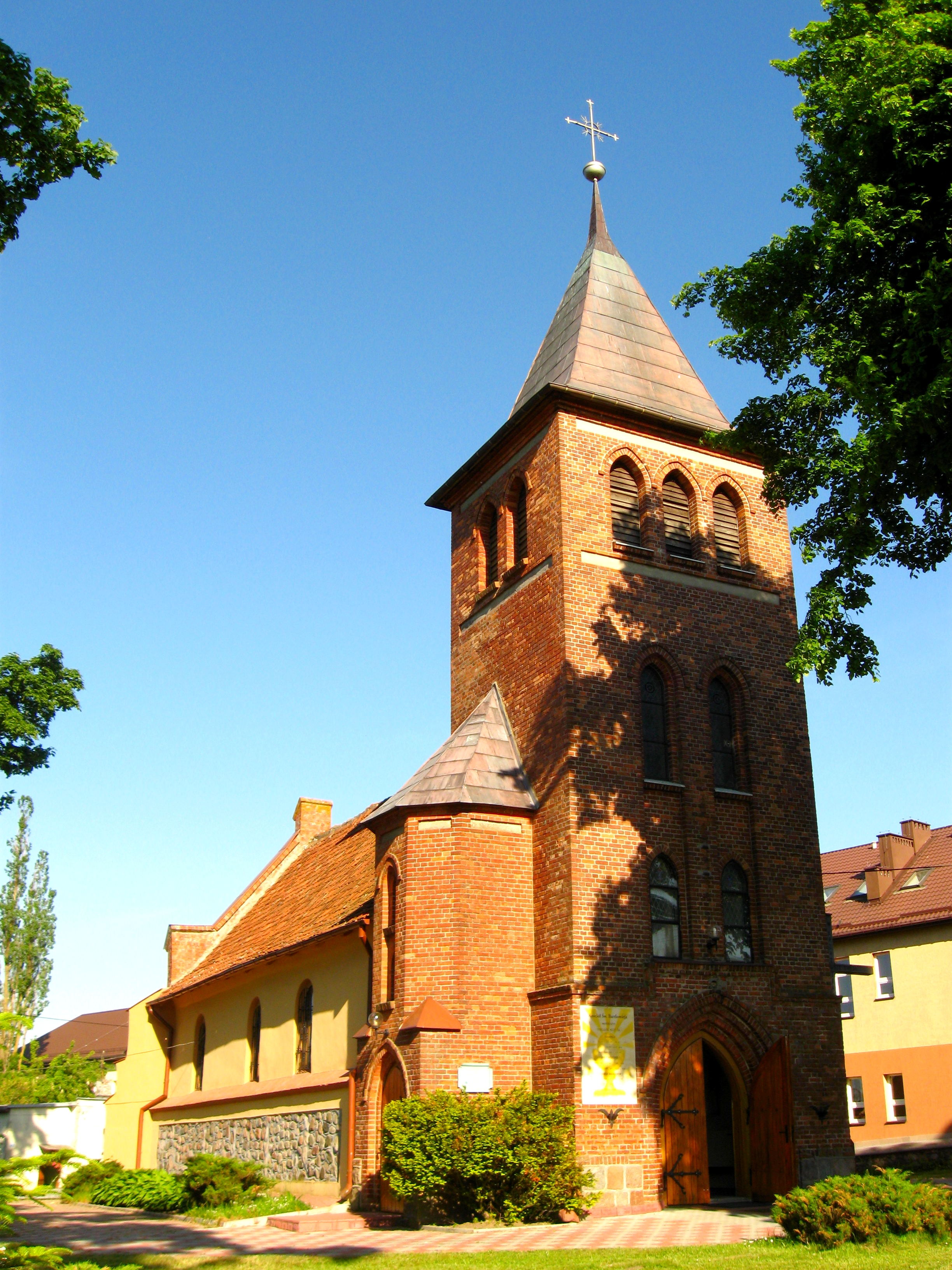 Mierzeszyn - kościół parafialny p.w. Św. Bartłomieja w Mierzeszynie (zabytek nr rejestr. A-311)